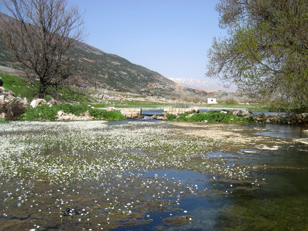 Marais d'Aammiq (Beqaa) au Printemps